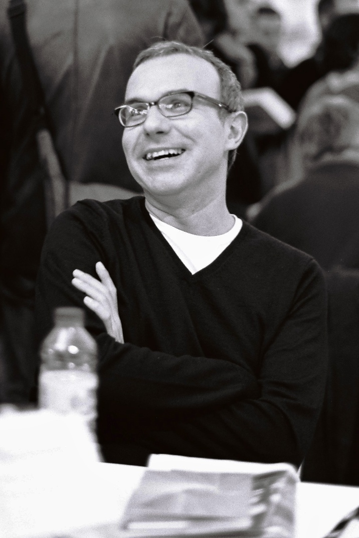 Philippe Besson au salon du livre Radio France, 26 novembre 2011